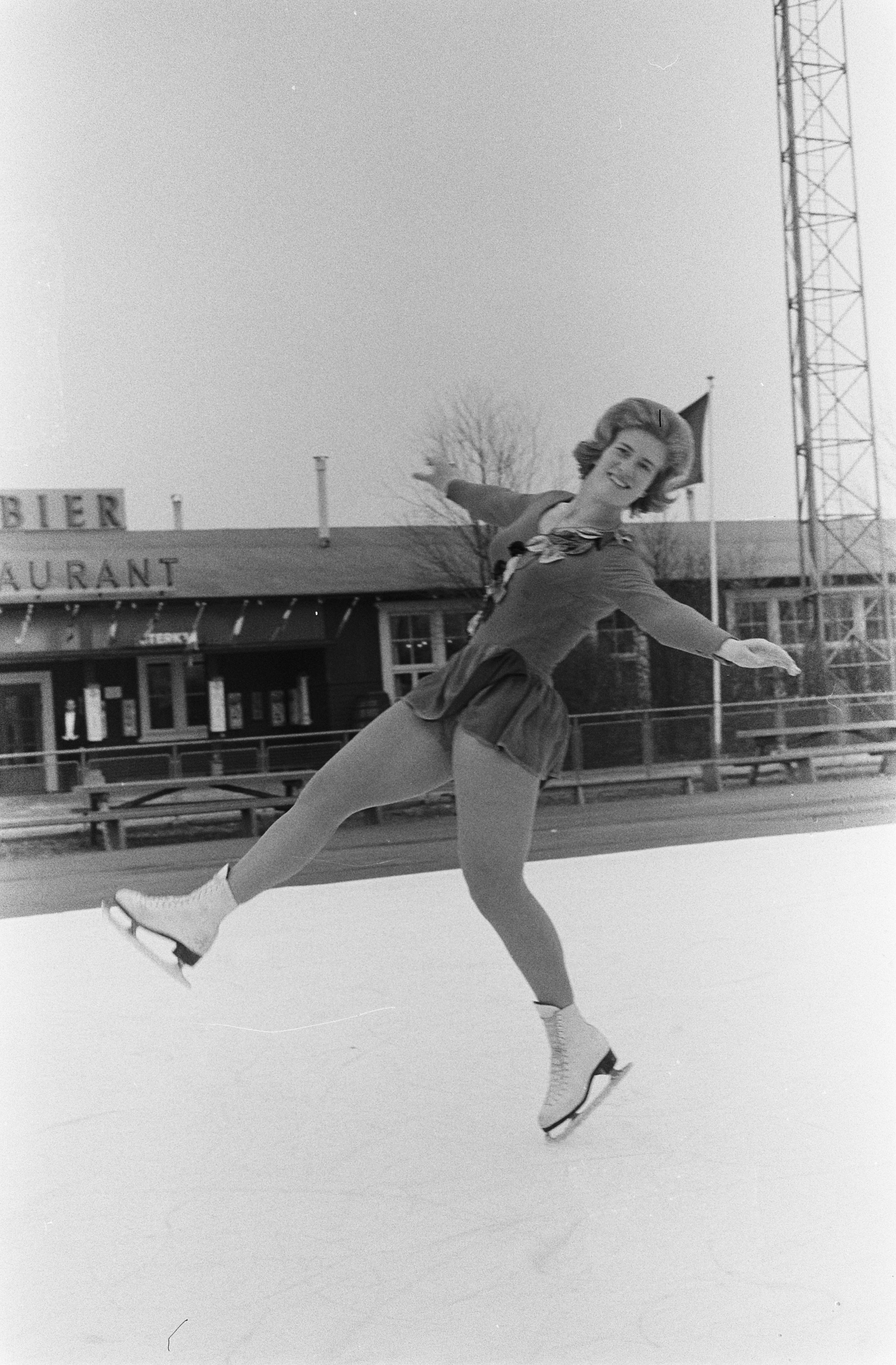 Collectie / Archief : Fotocollectie Anefo Reportage / Serie : [ onbekend ] Beschrijving : Sjoukje Dijkstra geeft demonstratie op Jaap Edenbaan te Amsterdam. Nr. 4, 5, 6, Sjoukje Dijkstra Datum : 17 maart 1963 Locatie : Amsterdam, Noord-Holland Trefwoorden : demonstraties Persoonsnaam : Dijkstra, Sjoukje, Eden, Jaap Fotograaf : Pot, Harry / Anefo Auteursrechthebbende : Nationaal Archief Materiaalsoort : Negatief (zwart/wit) Nummer archiefinventaris : bekijk toegang 2.24.01.05 Bestanddeelnummer : 914-9377